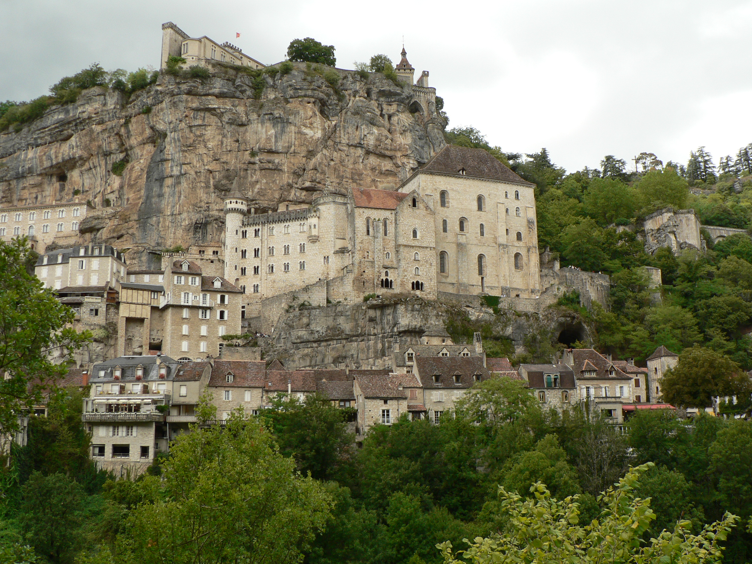 Rocamadour (France) vue générale par temps gris